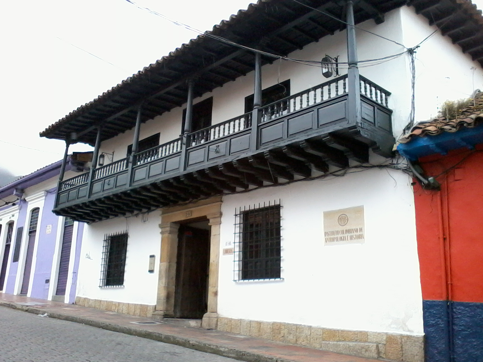 Sede del instituto de cultura hispánica. Instituto colombiano de antropología e historia. Calle 12 2-41, Bogotá (Colombia)